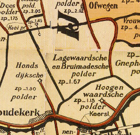 Lagenwaardse polder